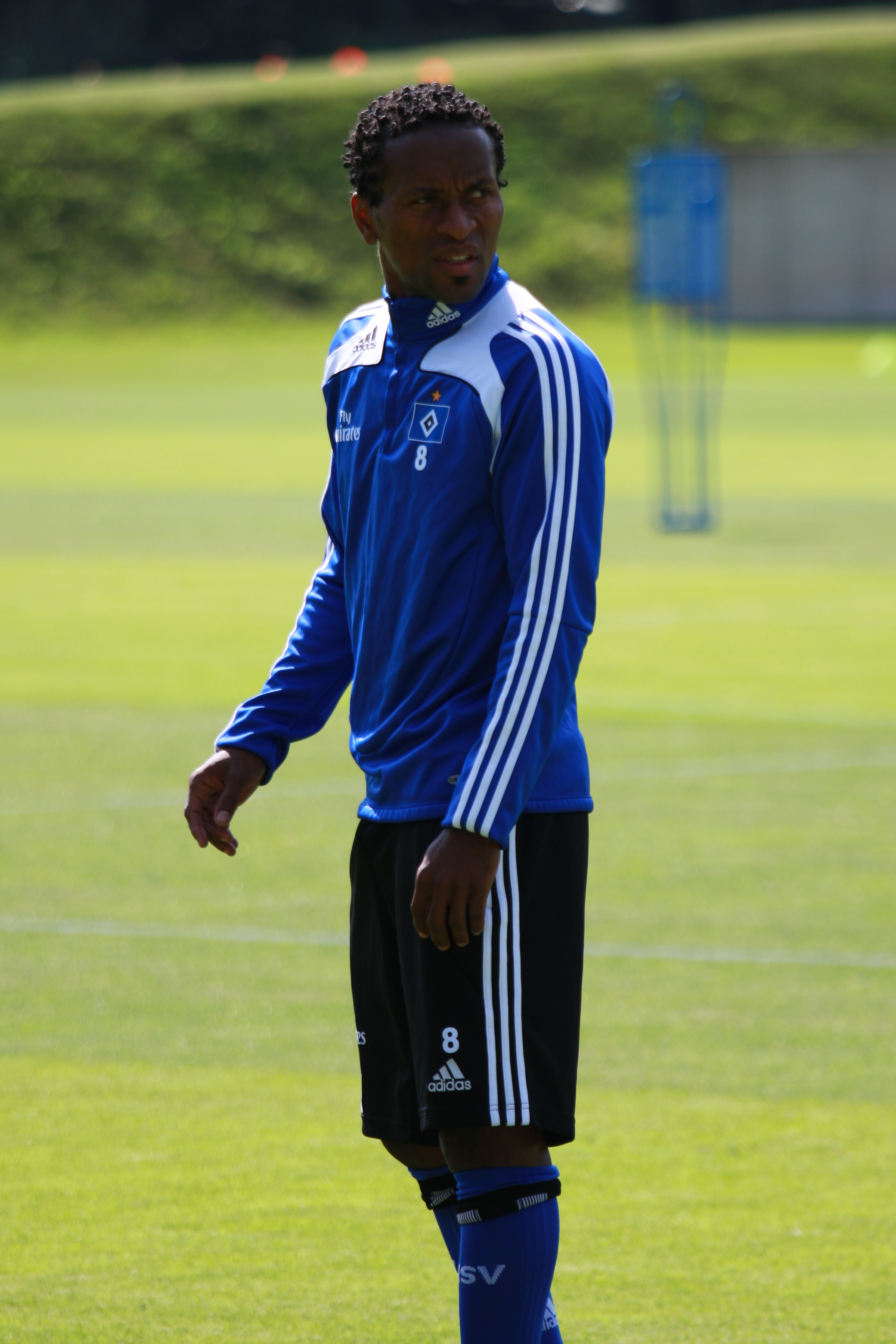 Zé Roberto beim Training an der HSH- Nordbank- Arena